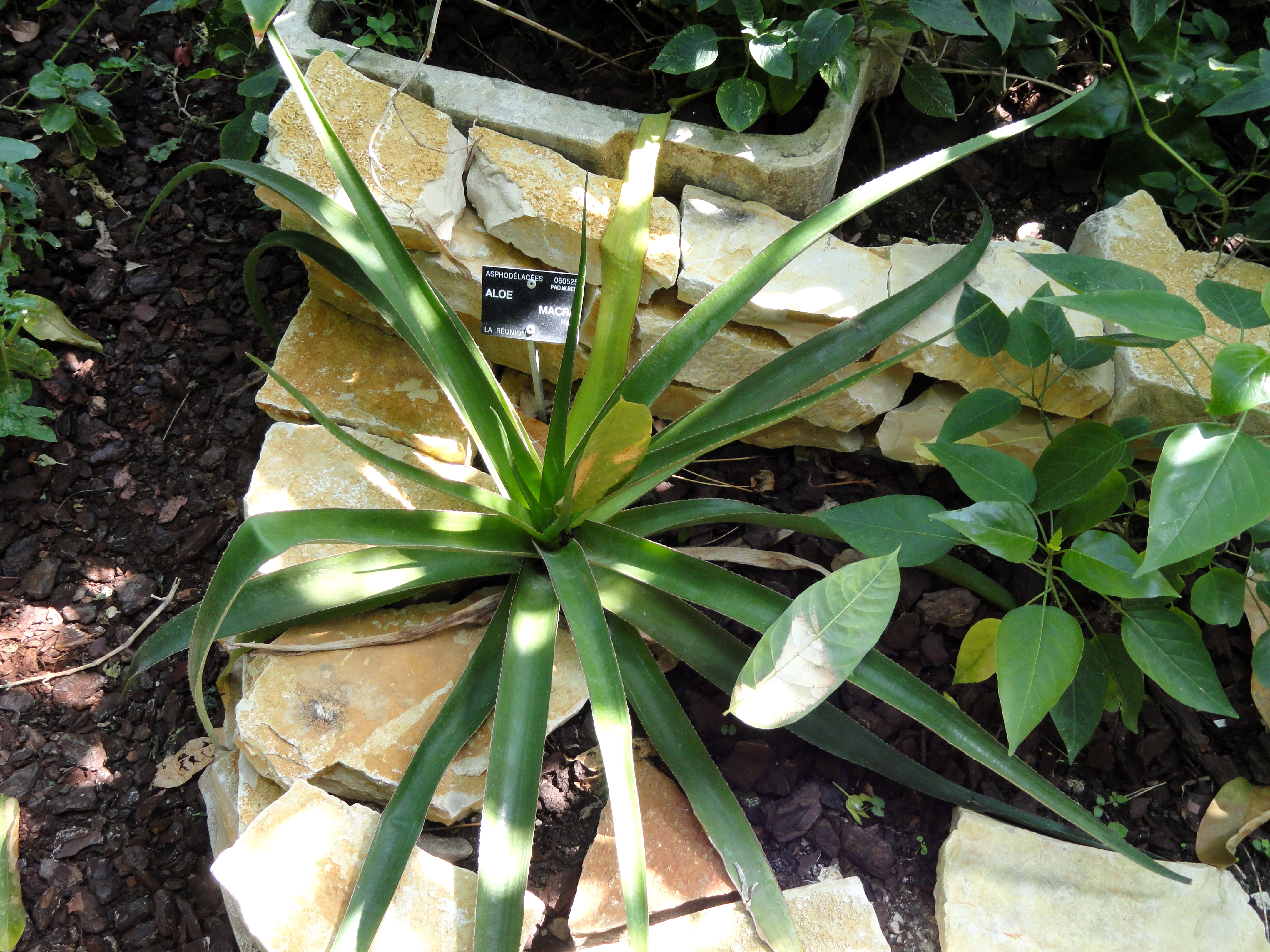 Aloe macra specimen in the Jardin Botanique de Lyon, Parc de la Tête d'Or, Lyon, France.